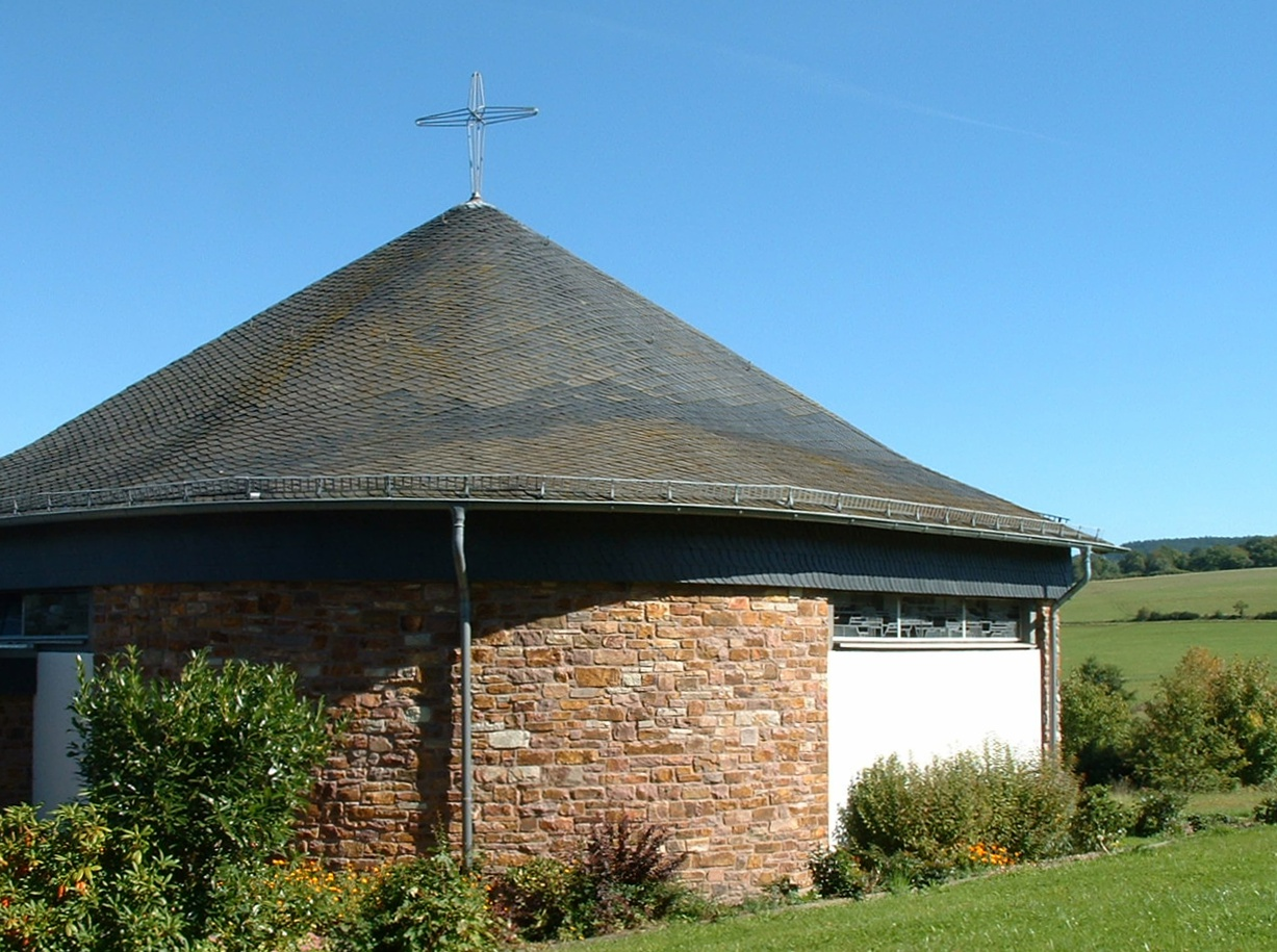 Evangelische Trinitatiskirche in Deuselbach (Rheinlad-Pfalz, Hunsrück)